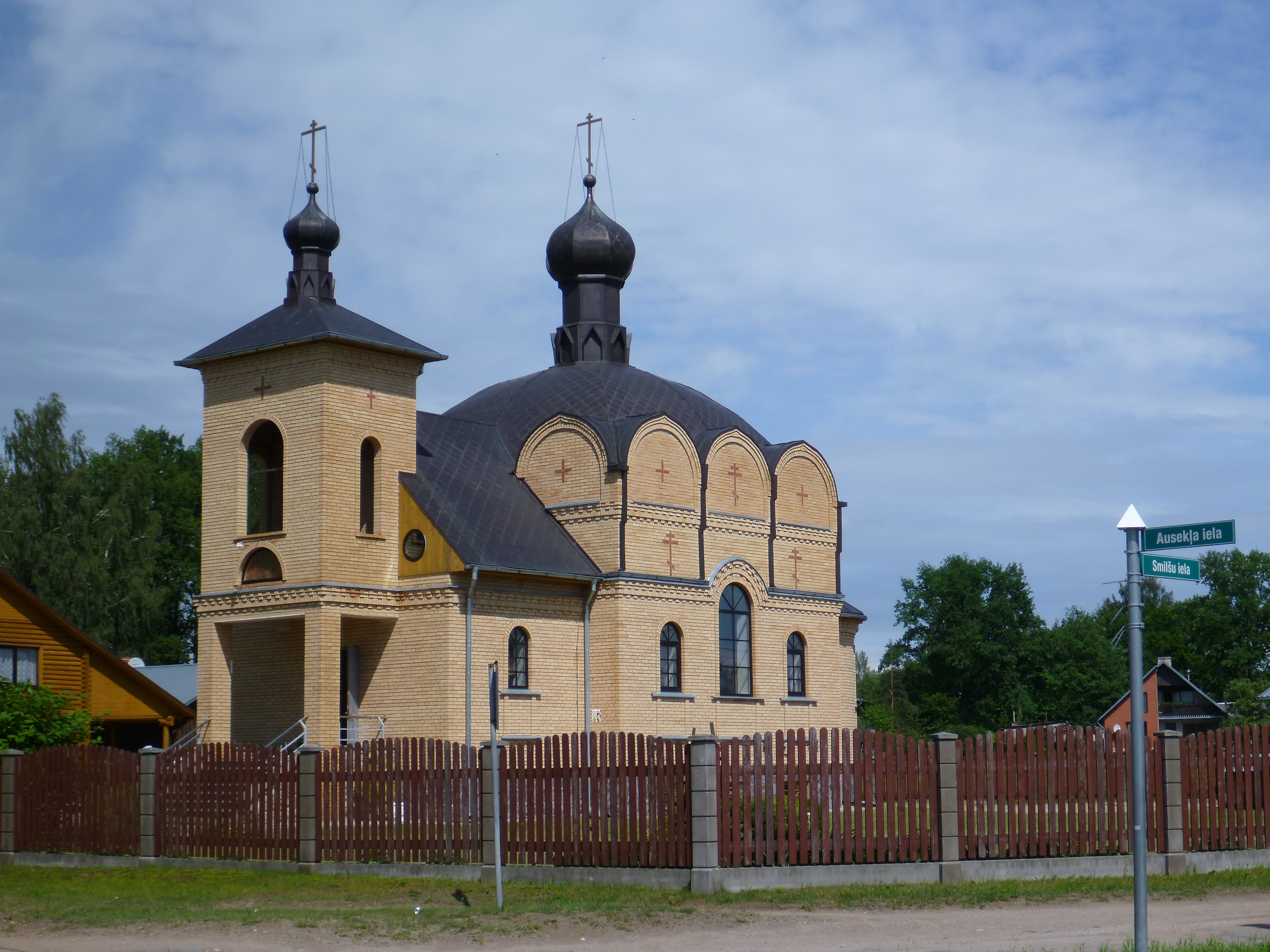 Valkan ortodoksinen kirkki